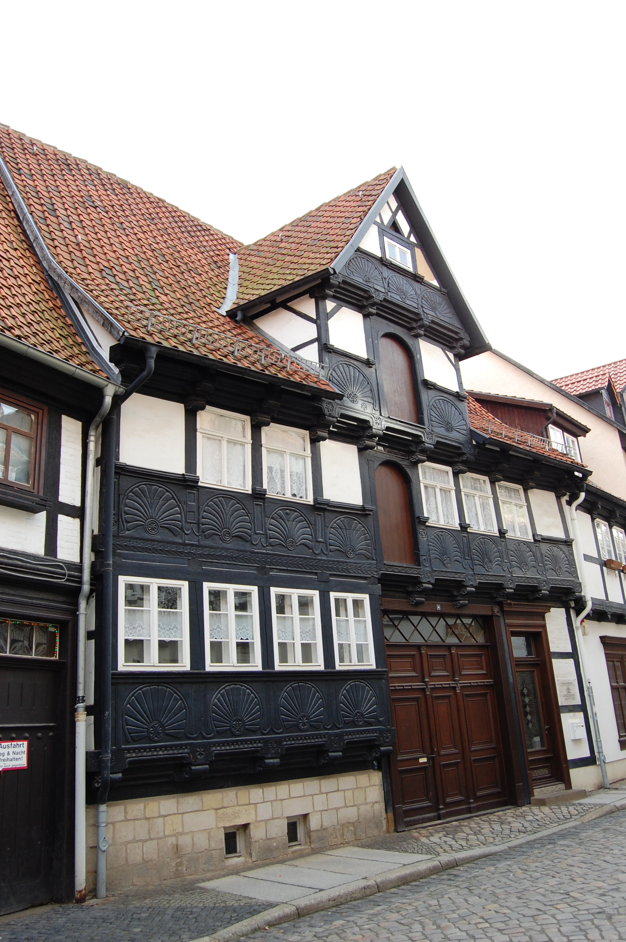 Haus Hohe Straße 8 in Quedlinburg, das sogenannte Städteunion-Haus